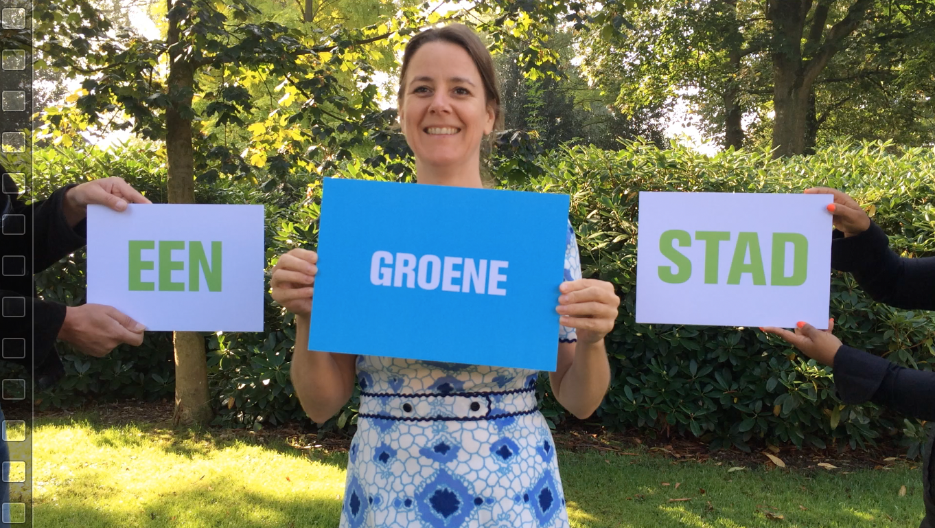 zie ook